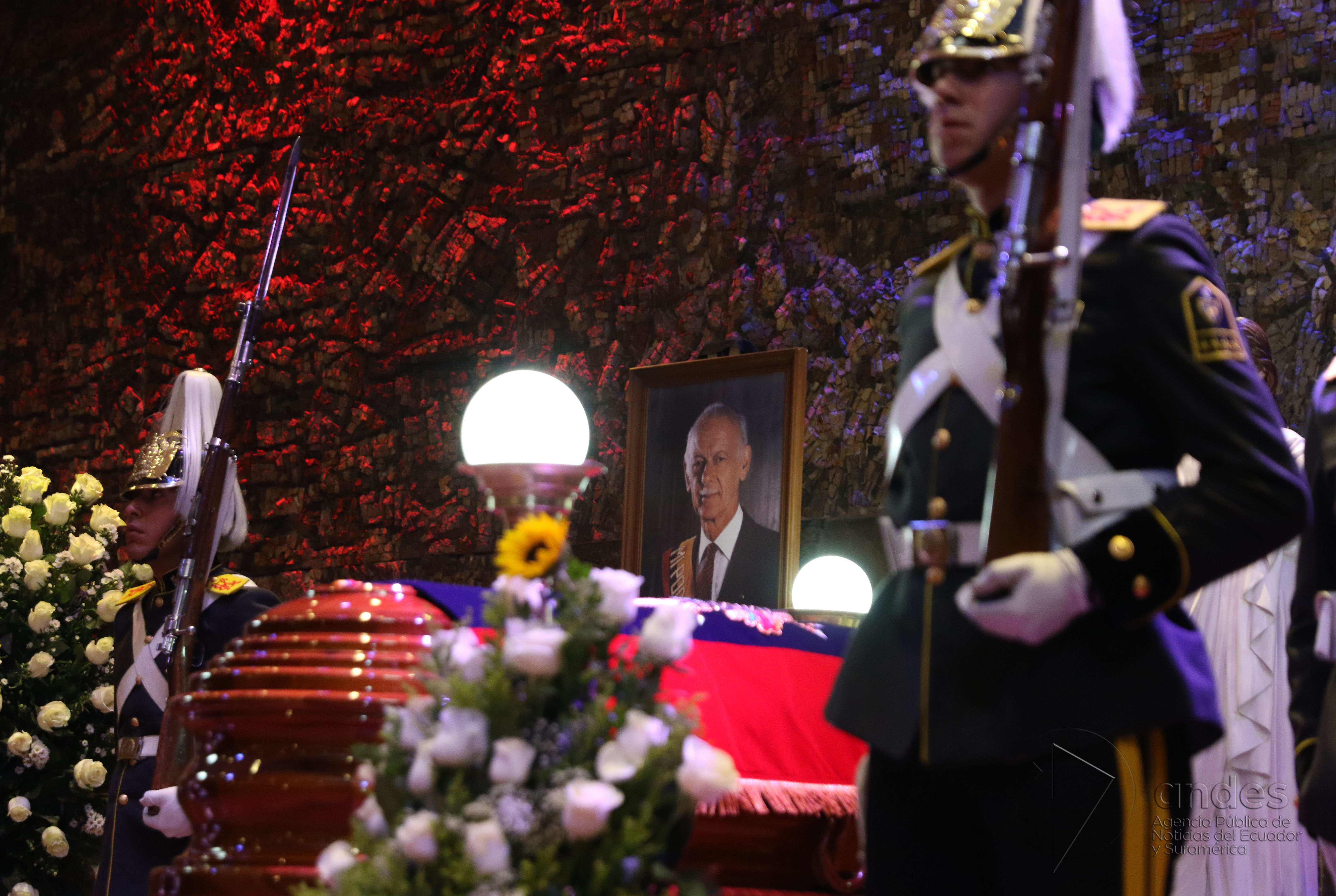 Quito, 16 nov (Andes).- Sepelio del ex presidente de la República Sixto Durán Ballén en el Salón de la Ciudad. ANDES/Micaela Ayala V.